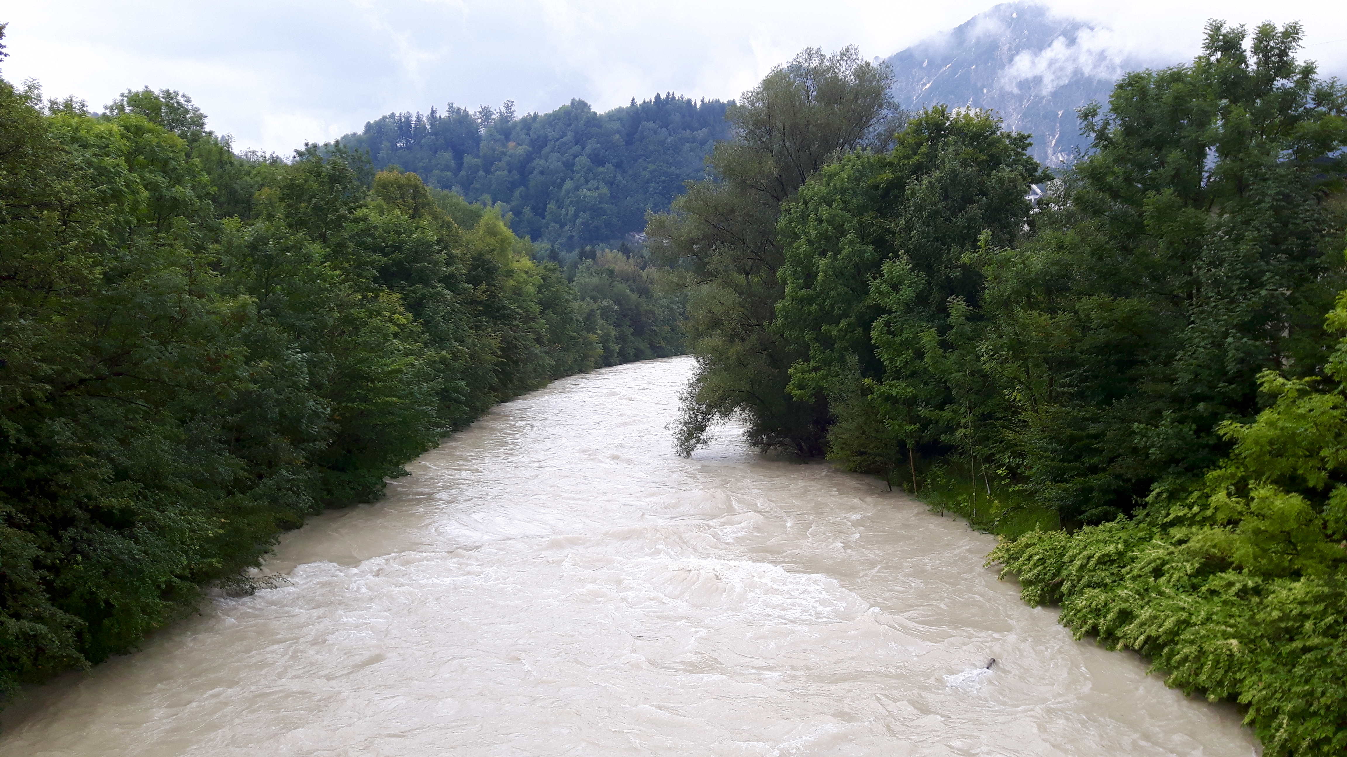 Königsseeache in Niederalm, Gemeinde Anif, Salzburg.